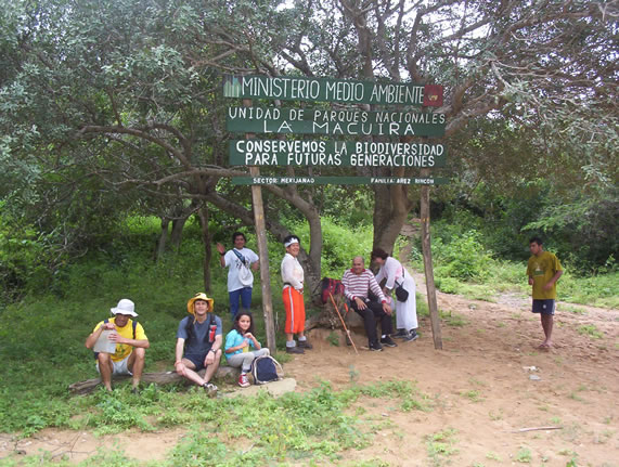 Entrada al Parque de la Macuira